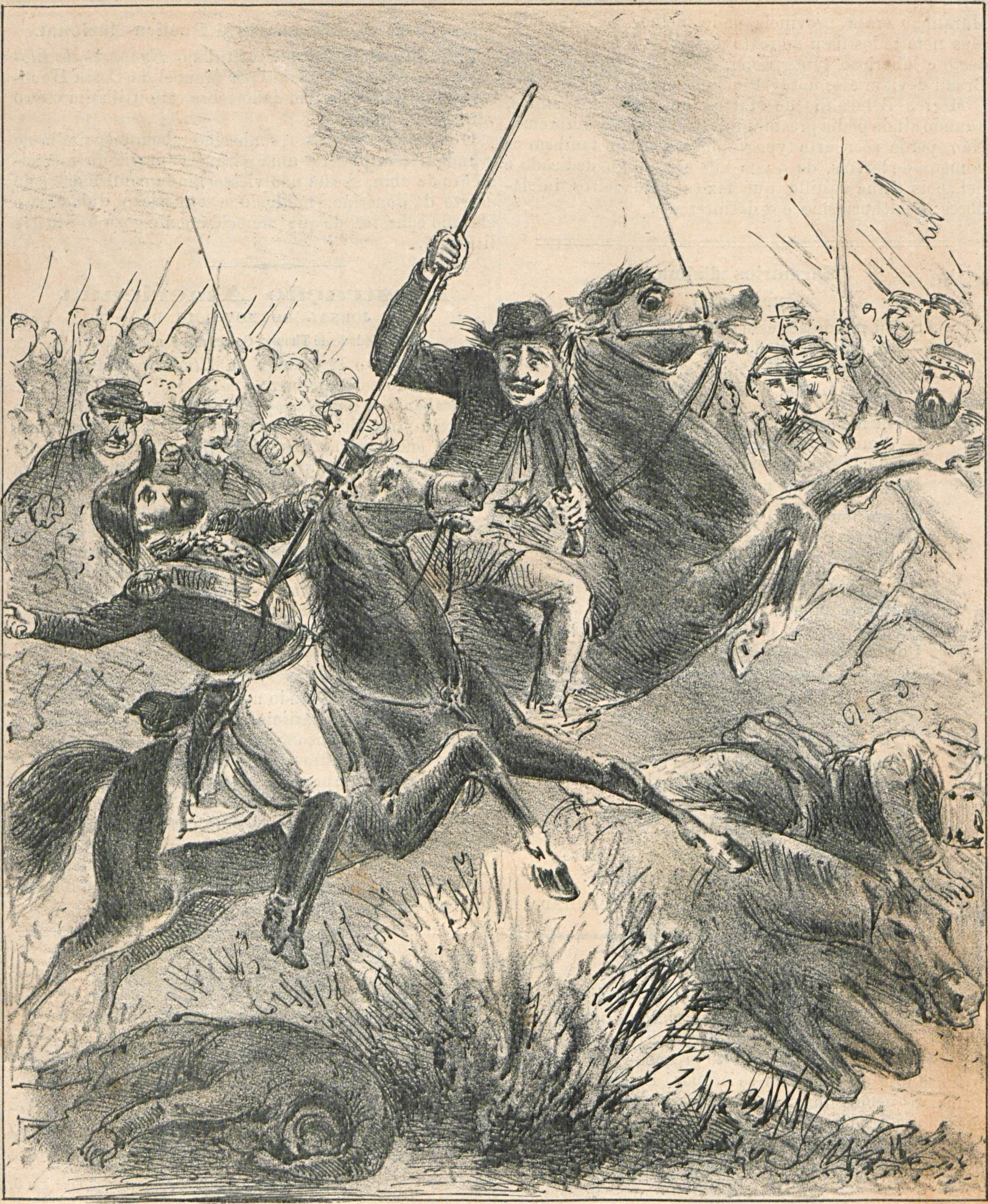 Chico Diabo atravessando com uma lança Solano López (Semana Illustrada nº 485, 27/03/1870).